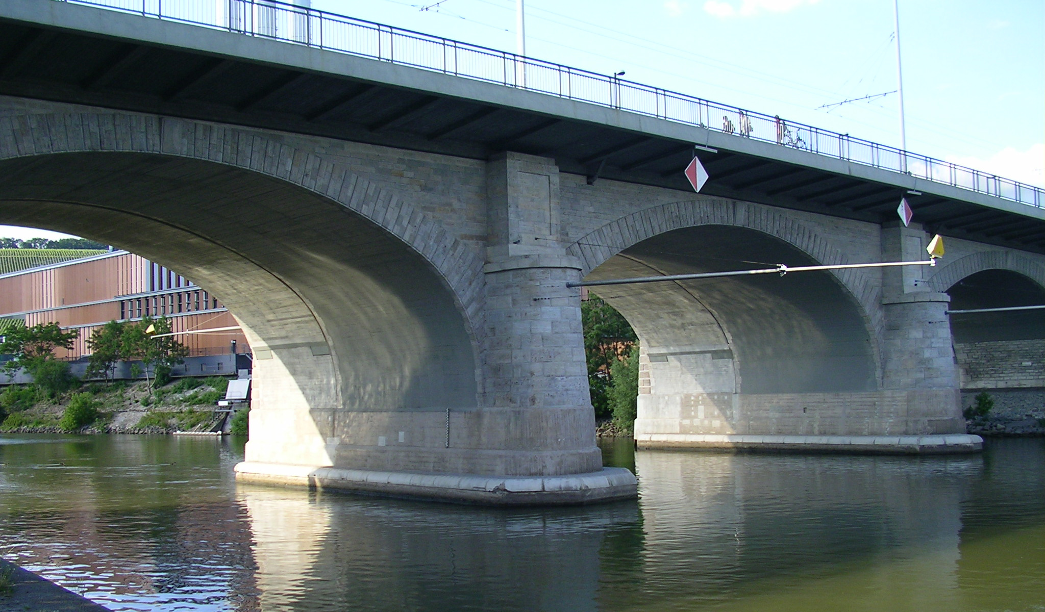 Die beiden im Main stehenden Pfeiler der "Friedensbrücke" (ehemals "Luitpoldbrücke") in Würzburg. Die Pfeiler wurden bei der Verbreiterung der Brücke in den Jahren 1998 und 1999 mit einer Ummantelung als Anfahrschutz vor Schiffen versehen.